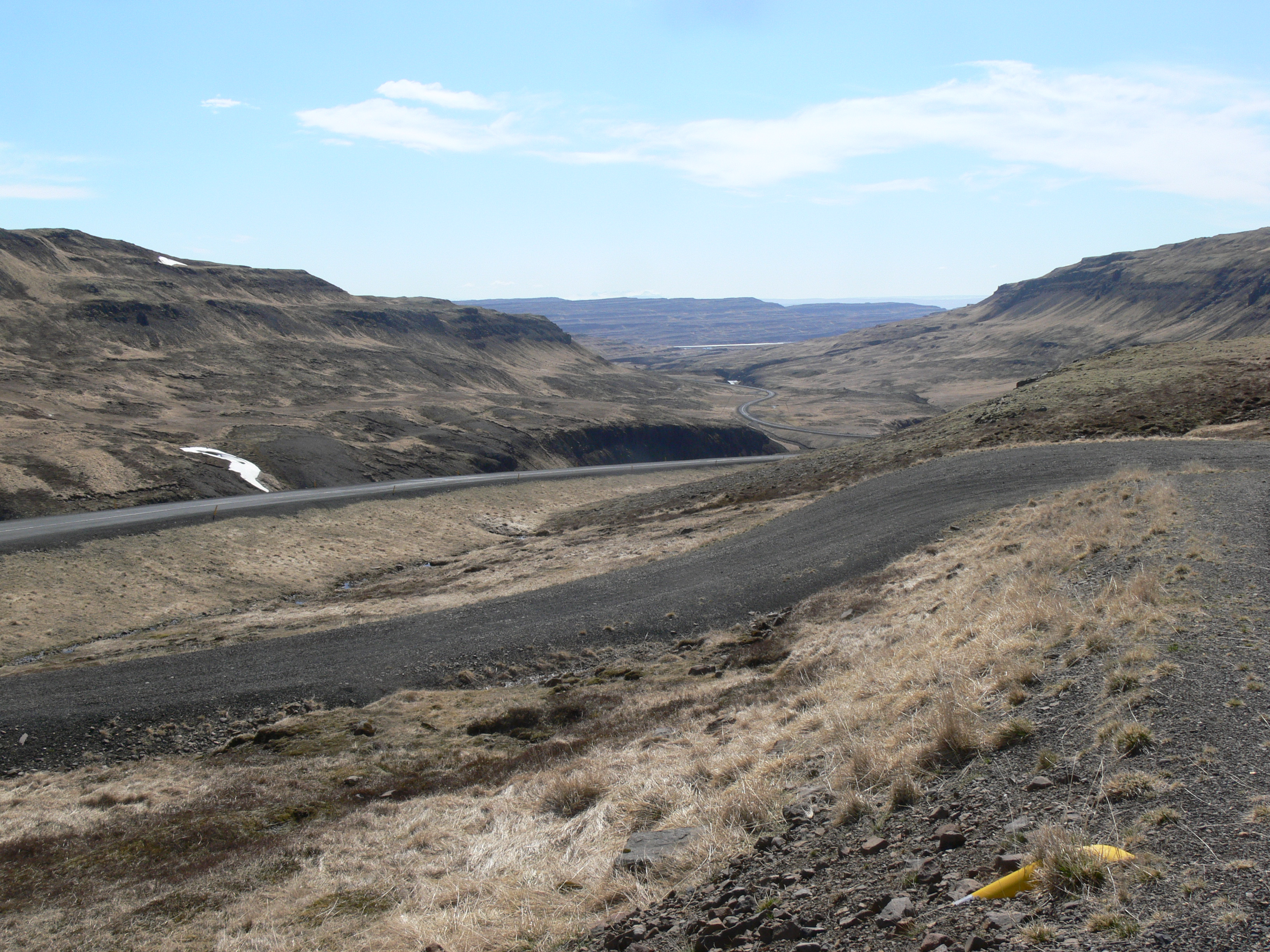 Blick von der Gegend um den Berg Baula auf Norðurárdalur in Richtung Bifröst.